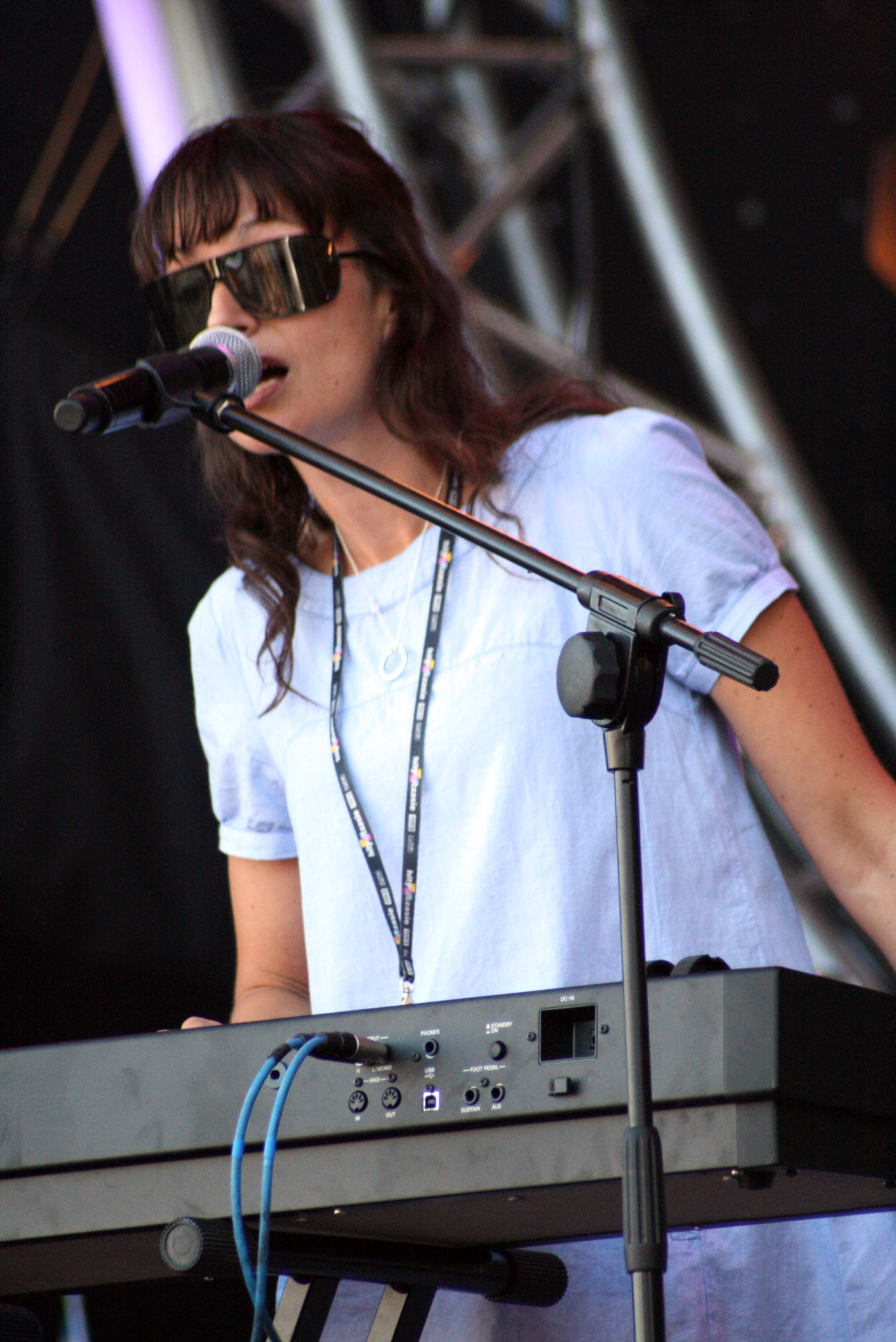 Marina Schiptjenko, koncert "Hity na czasie” - próba generalna. The Tall Ships' Races, Szczecin 2007